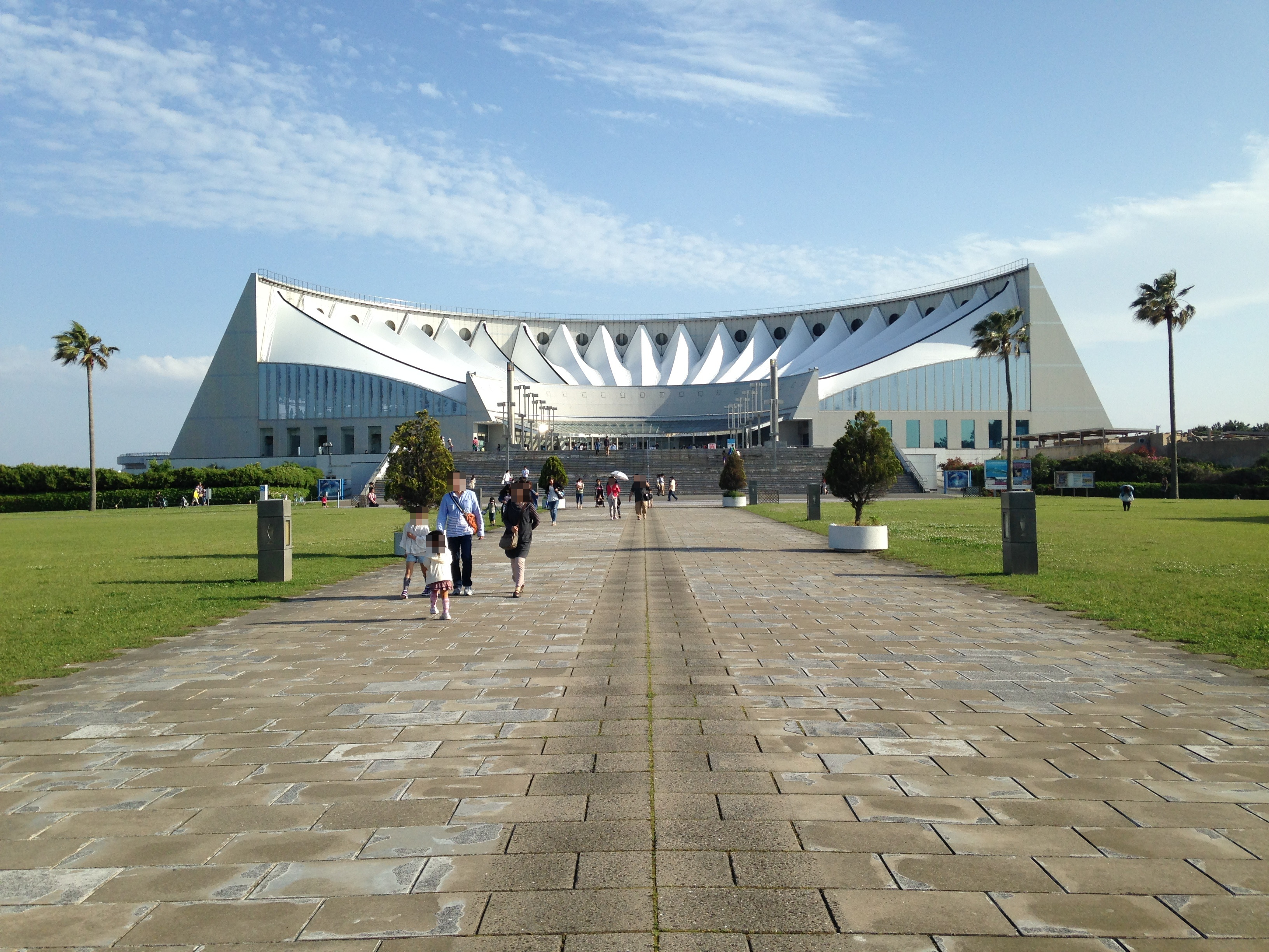 マリンワールド海の中道